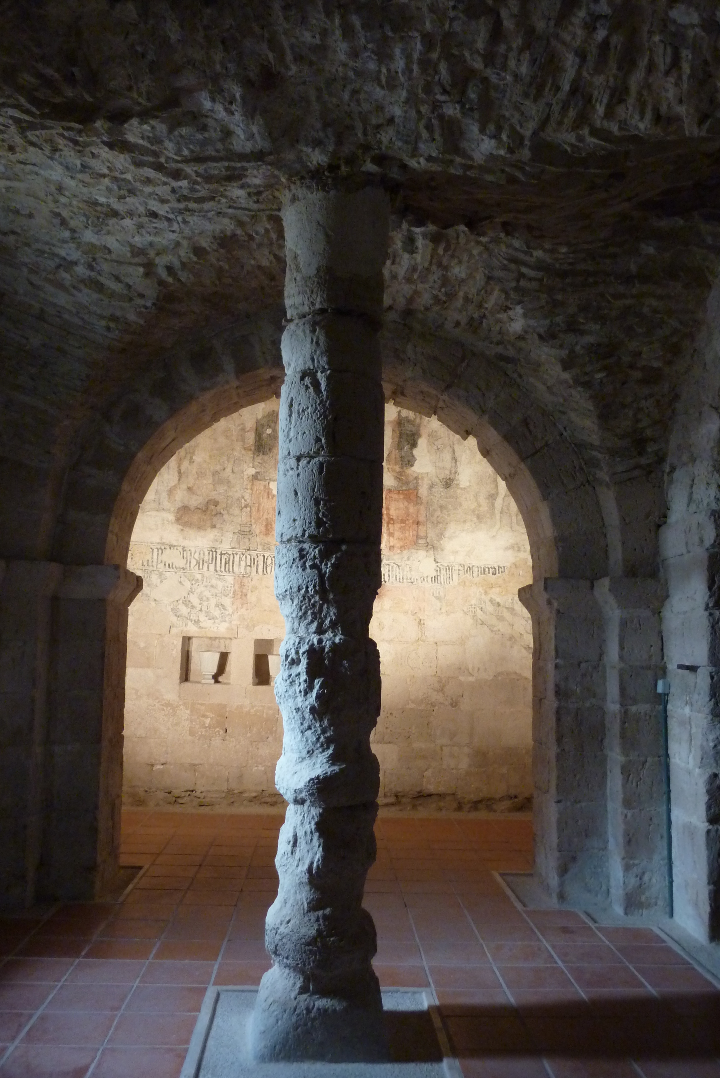 Santa María de Wamba, ehemalige Klostergebäude